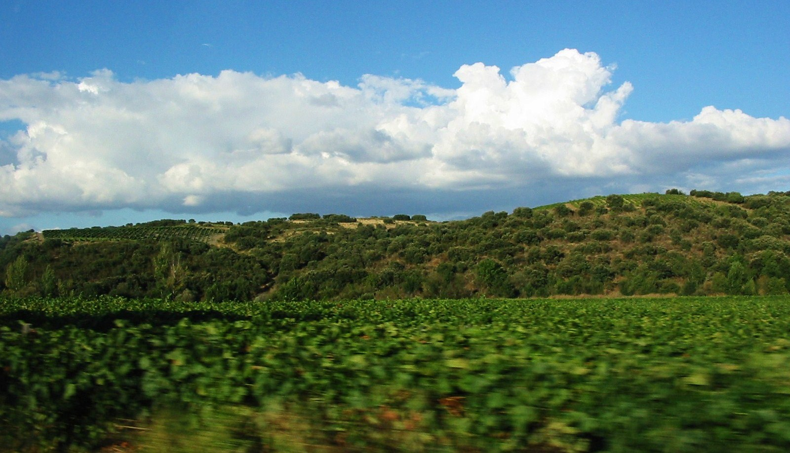 Vale da Teja